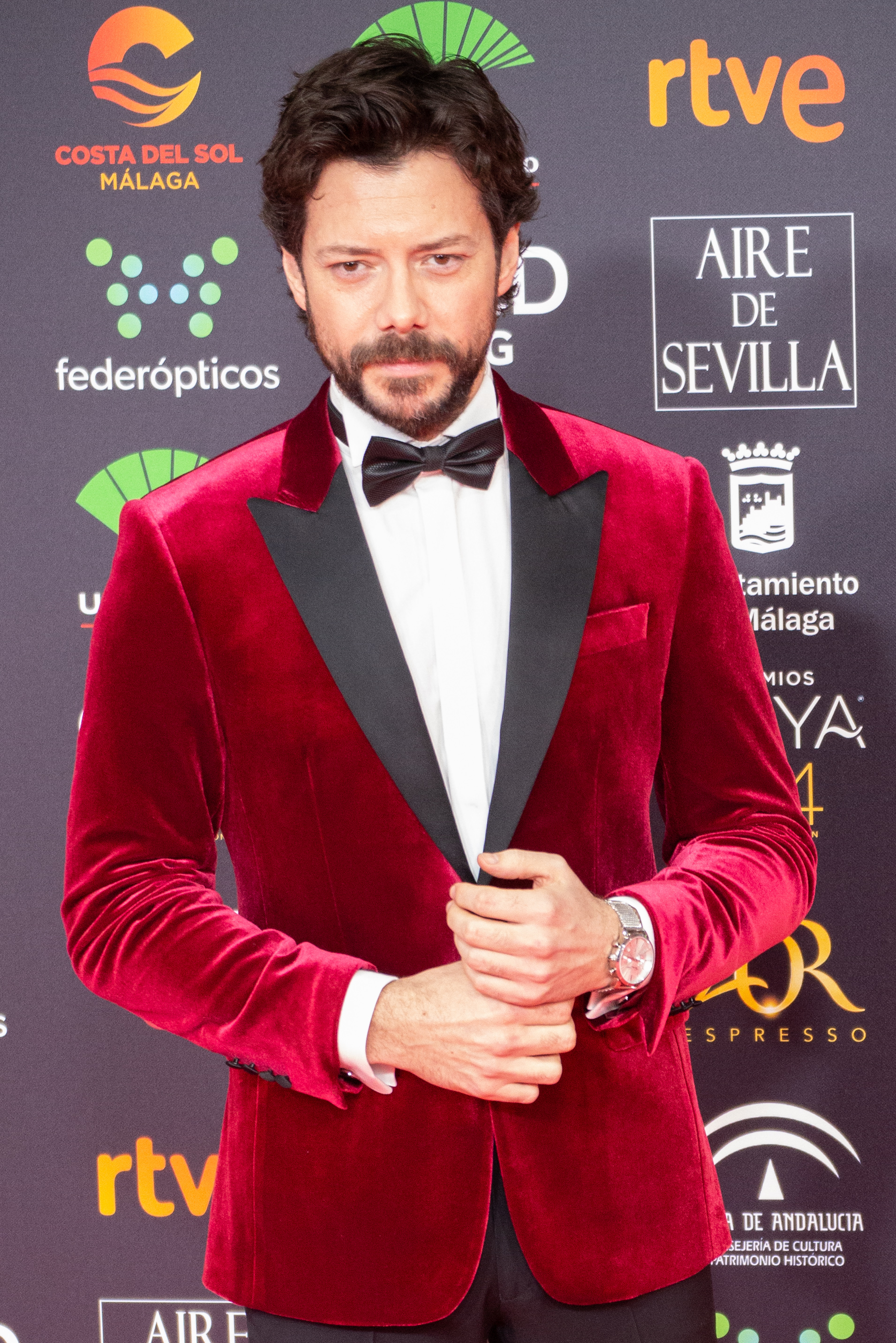 Álvaro Morte en la alfombra roja de los premios Goya celebrados en Málaga en enero de 2020